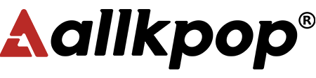 Logo von allkpop